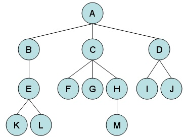 Primjer stabla.